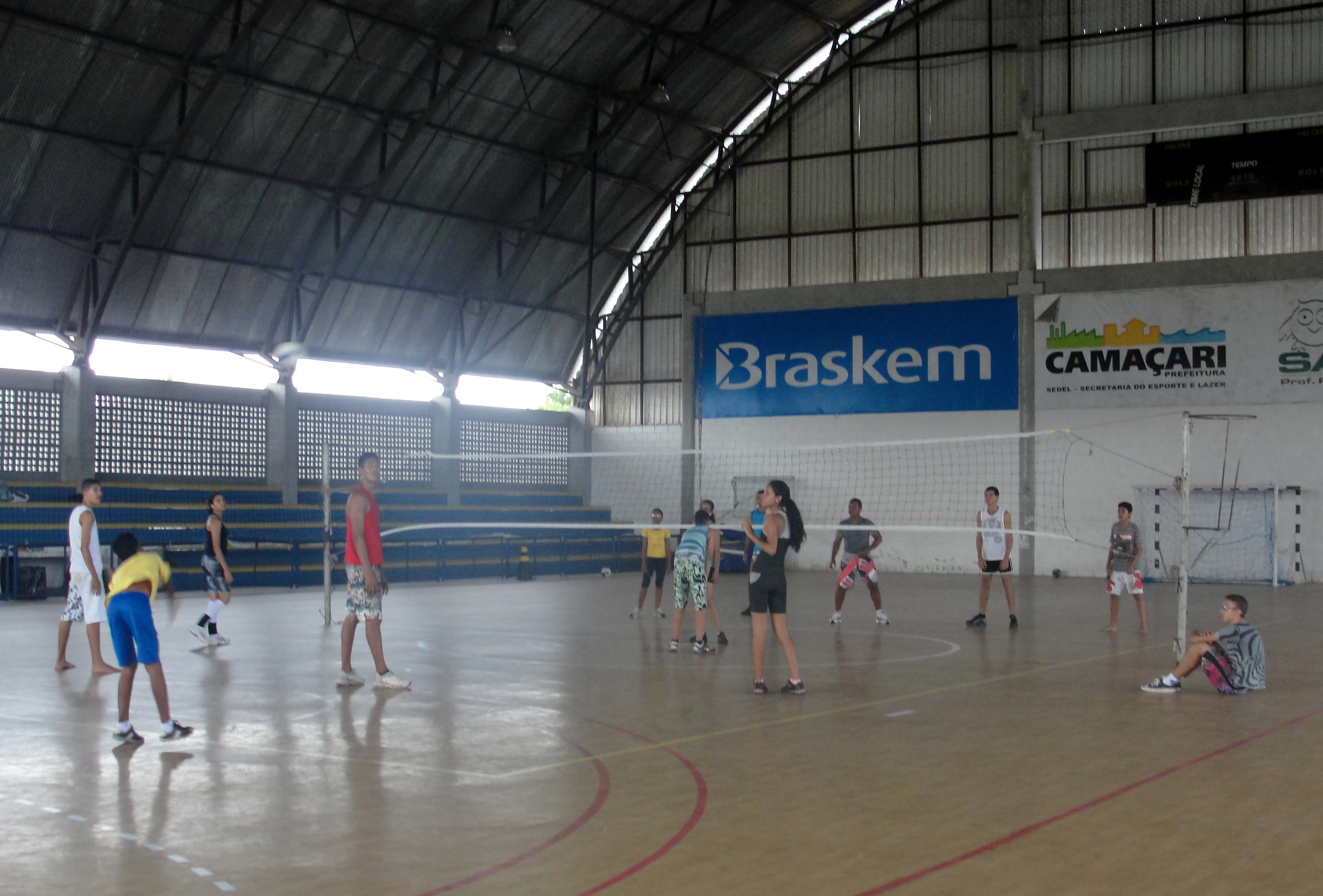 Pessoas jogando vôlei em ginásio em Camaçari, Bahia, Brasil